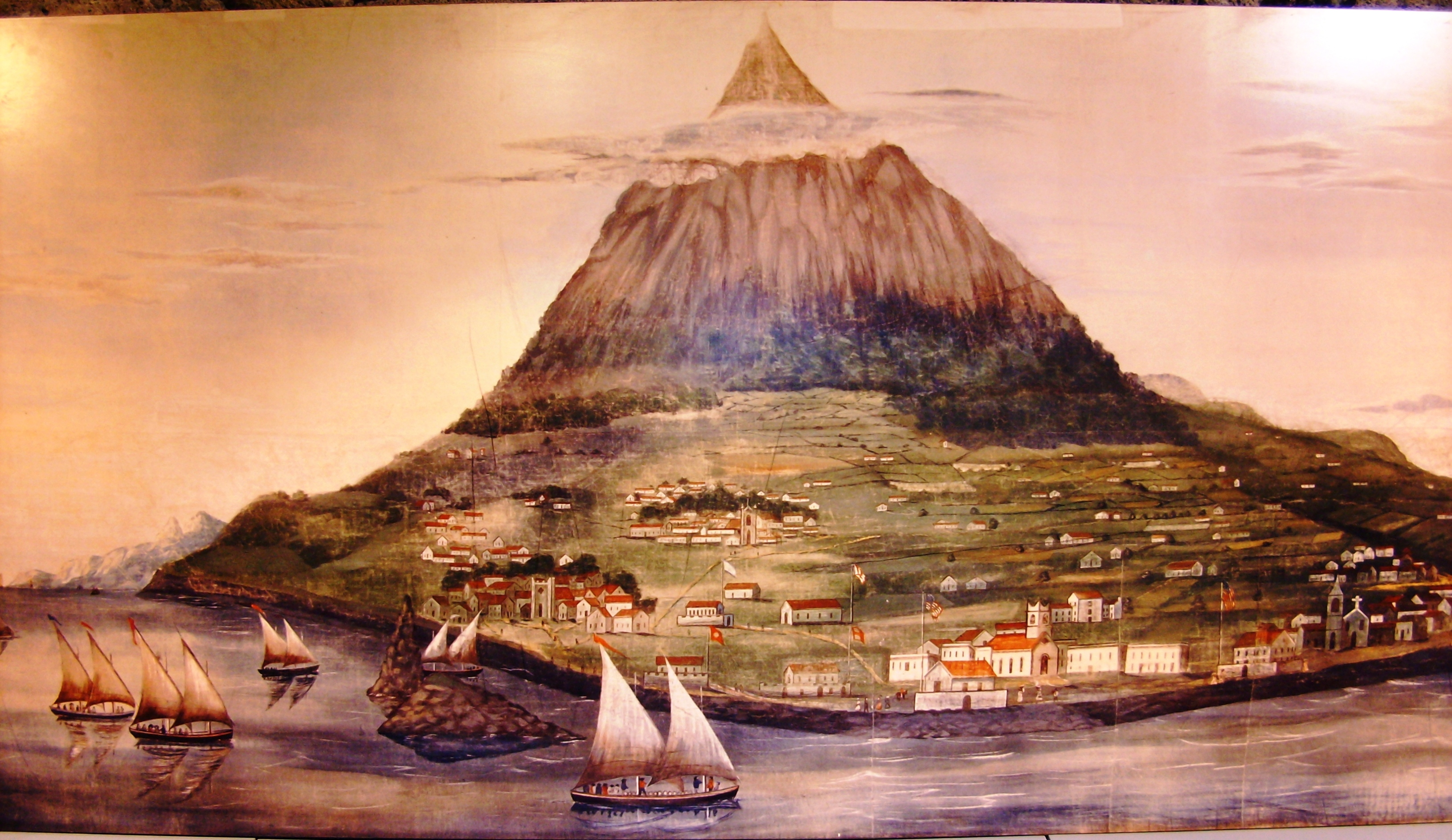 Ilha do Pico (detalhe). Benjamin Russell & Caleb Purrington. "Whaling Voyage 'Round the World". ca.1848. New Bedford Whaling Museum. in Museu dos Baleiros, Lajes do Pico.